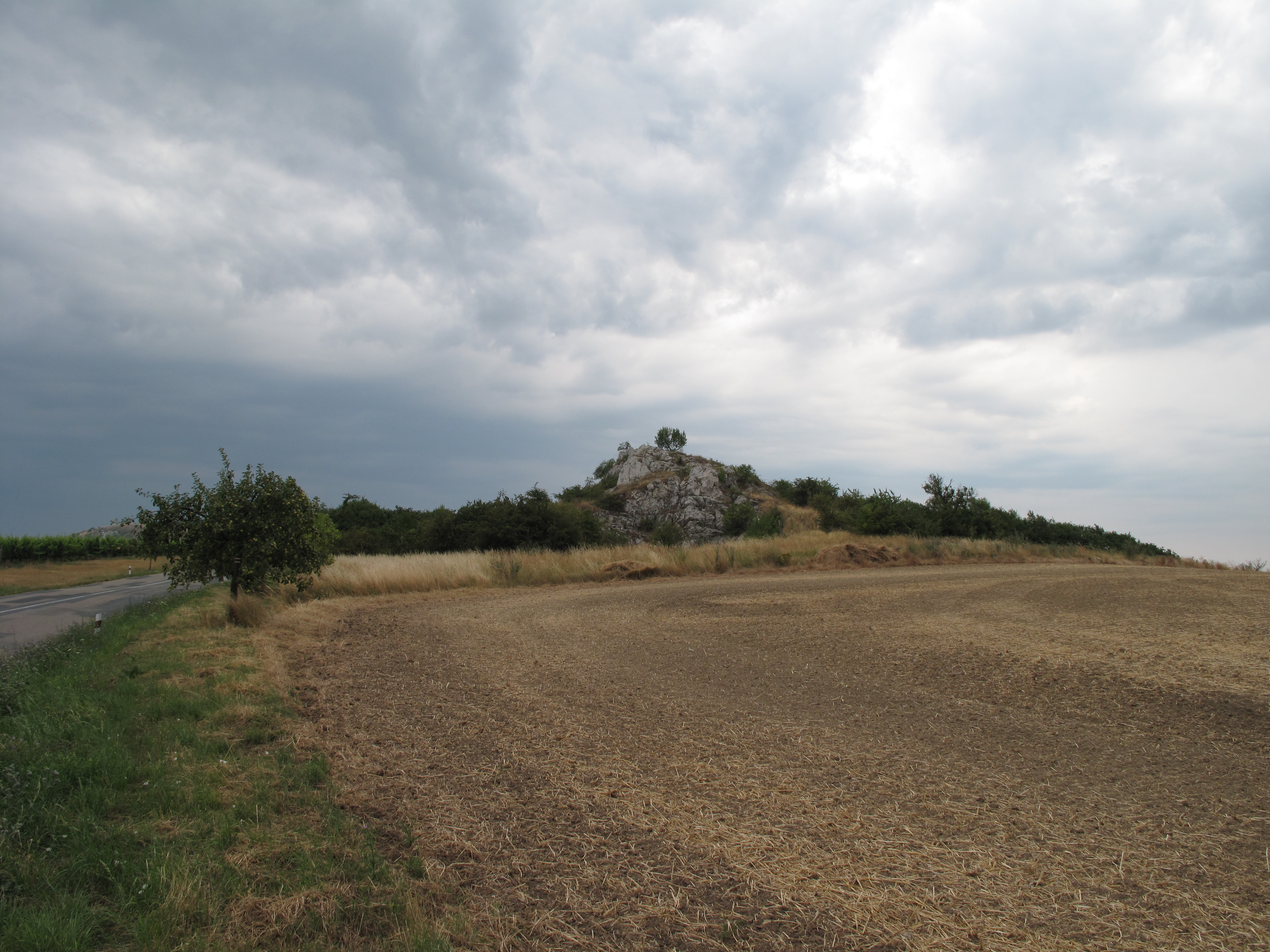 Přírodní památka Kočičí kámen. Okres Břeclav, Česká republika.